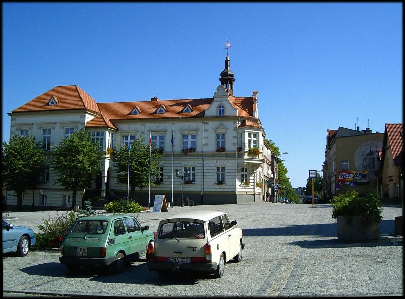 Валч.